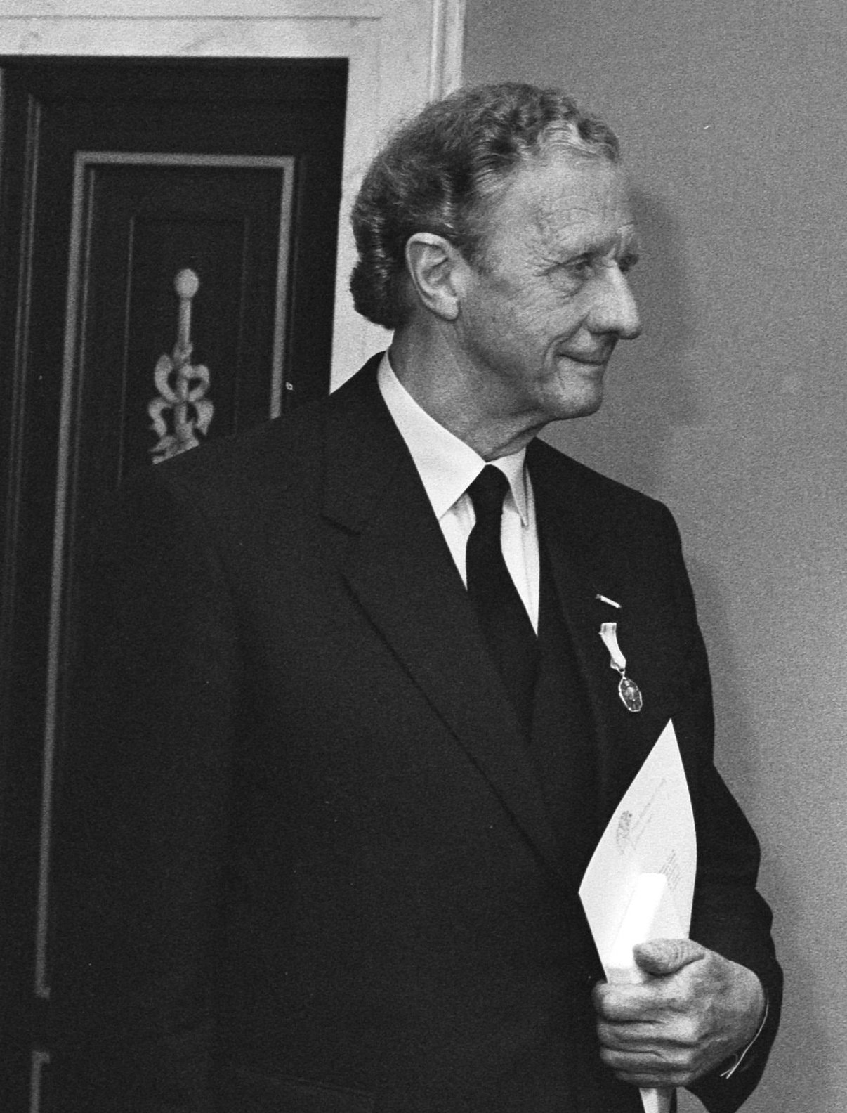 Uitreiking Zilveren Anjers ; v.l.n.r. A. Bokma , Prins Bernhard en M. Niemeijer